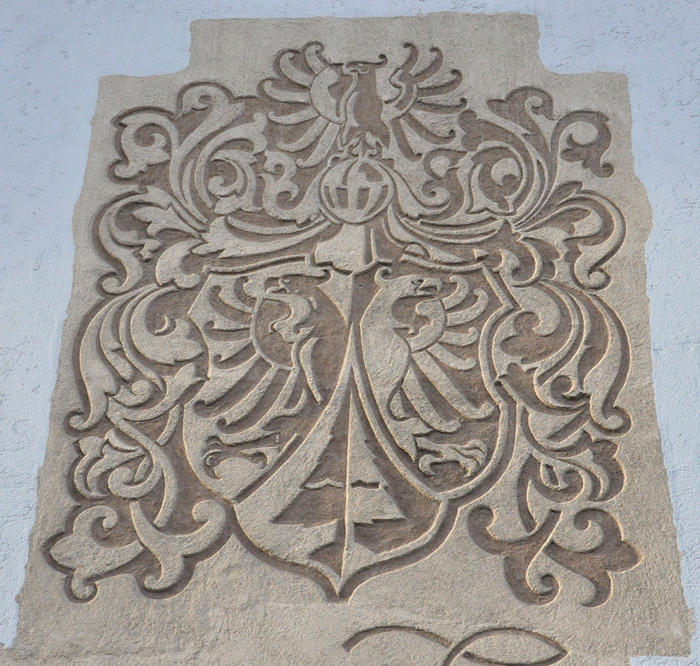 Scraffito Wolfsgruber